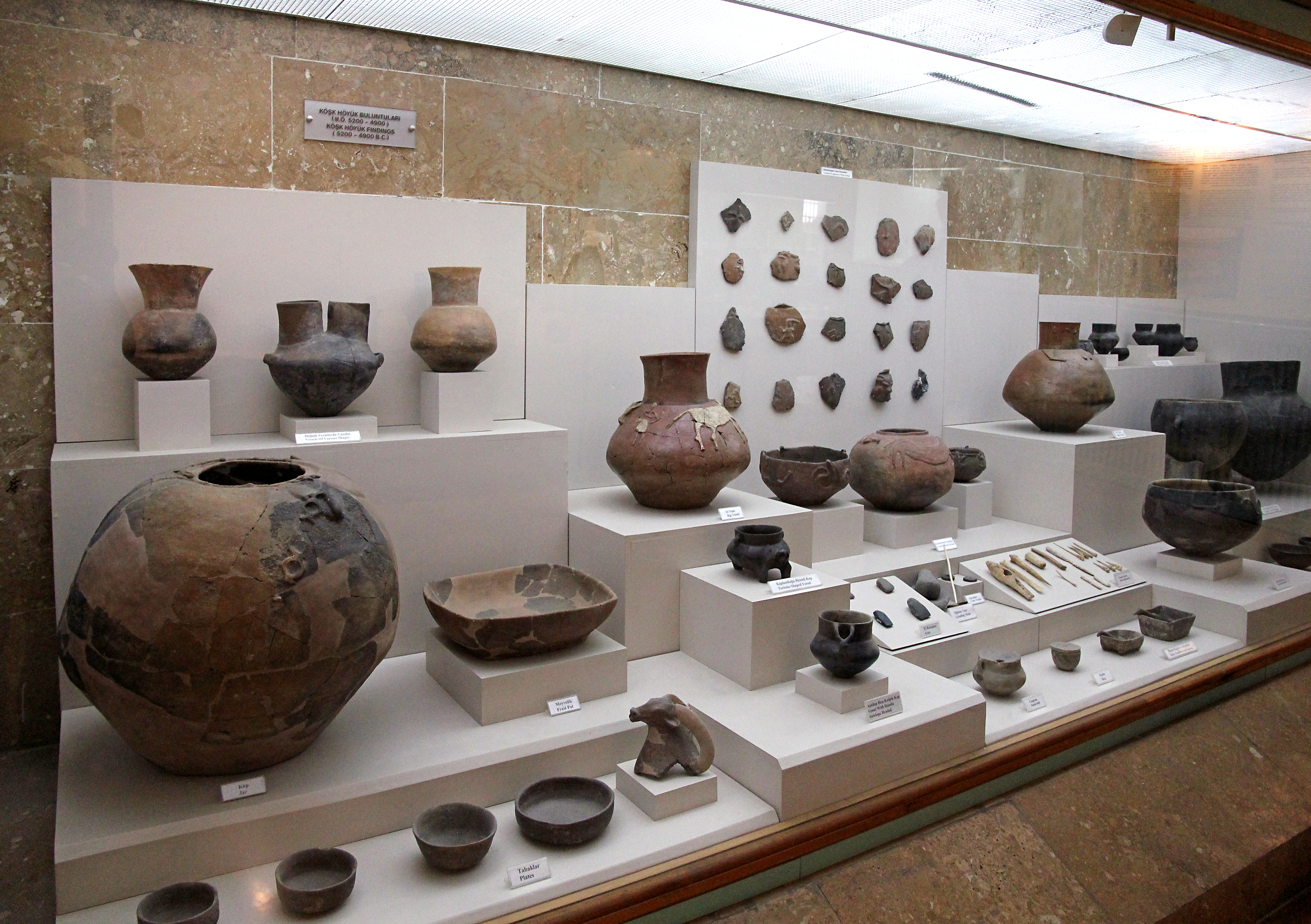 Archäologisches Museum Niğde, Türkei, Funde aus Köşk Höyük